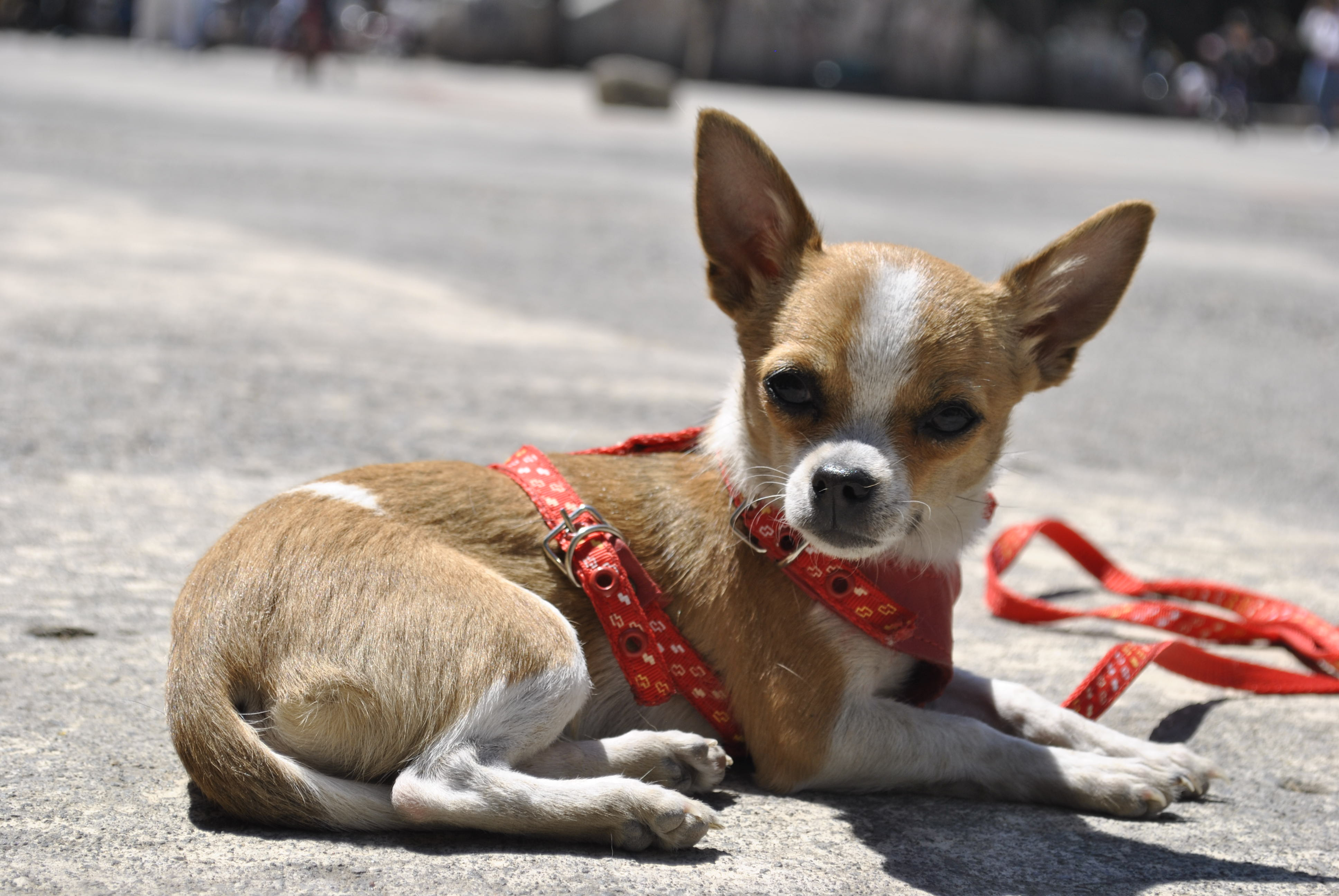 Un concurrente del parque México en DF